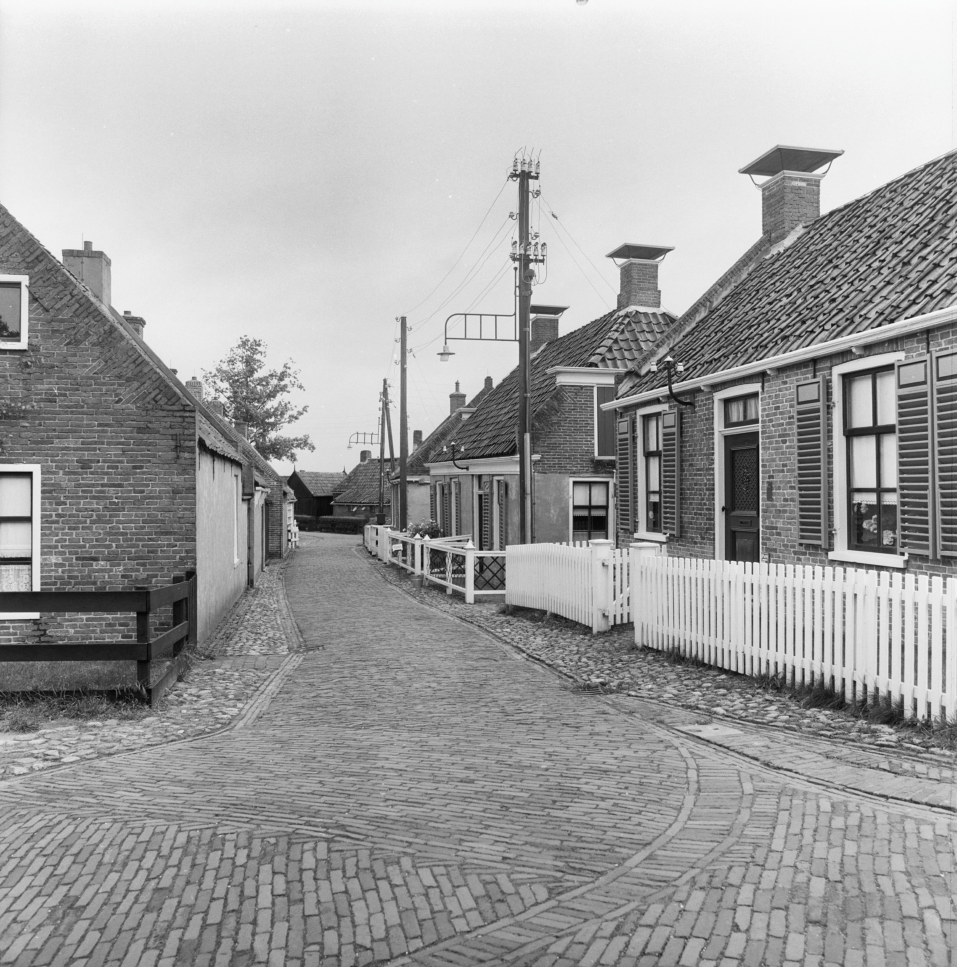 ZUIDERZEE MUSEUM, BUITENMUSEUM: Exterieur OVERZICHT